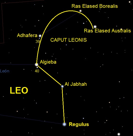 La cabeza del León o la Hoz